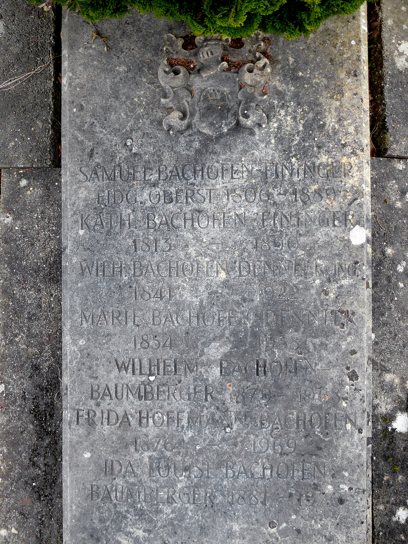 Samuel Bachofen-Fininger (1806–1889) Metzger, Eidg. Oberst, Politiker, Familiengrab auf dem Friedhof Hörnli, Riehen, Basel-Stadt